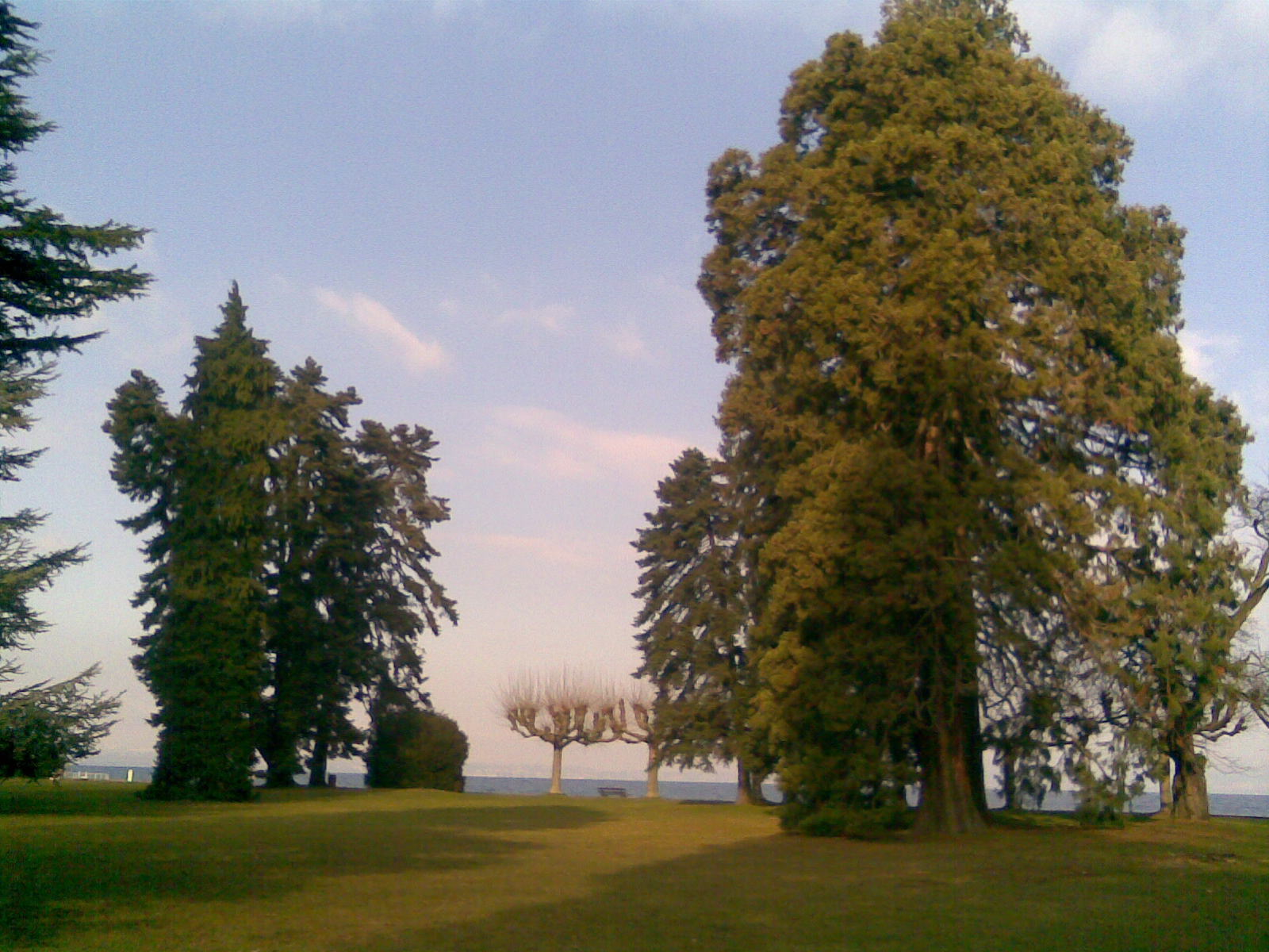 Le parc des cèdres à Amphion-les-bains.